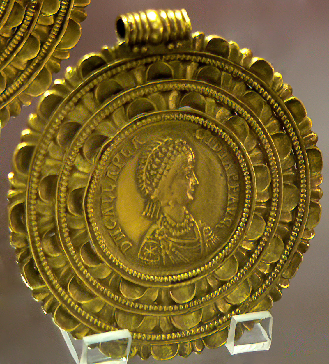 Médaillon de Galla Placidia Médaillon de Galla Placidia, frappé à Ravenne en 425. Il faisait partie, avec lemédaillon d'Honorius, d'un trésor monétaire, le Trésor de Velp (Pays-Bas), enfoui peu après 425 et découvert fortuitement en 1715. Ces deux médaillons d'or aux riches montures, étaient montées en collier. Acquis le 16 janvier 1883.